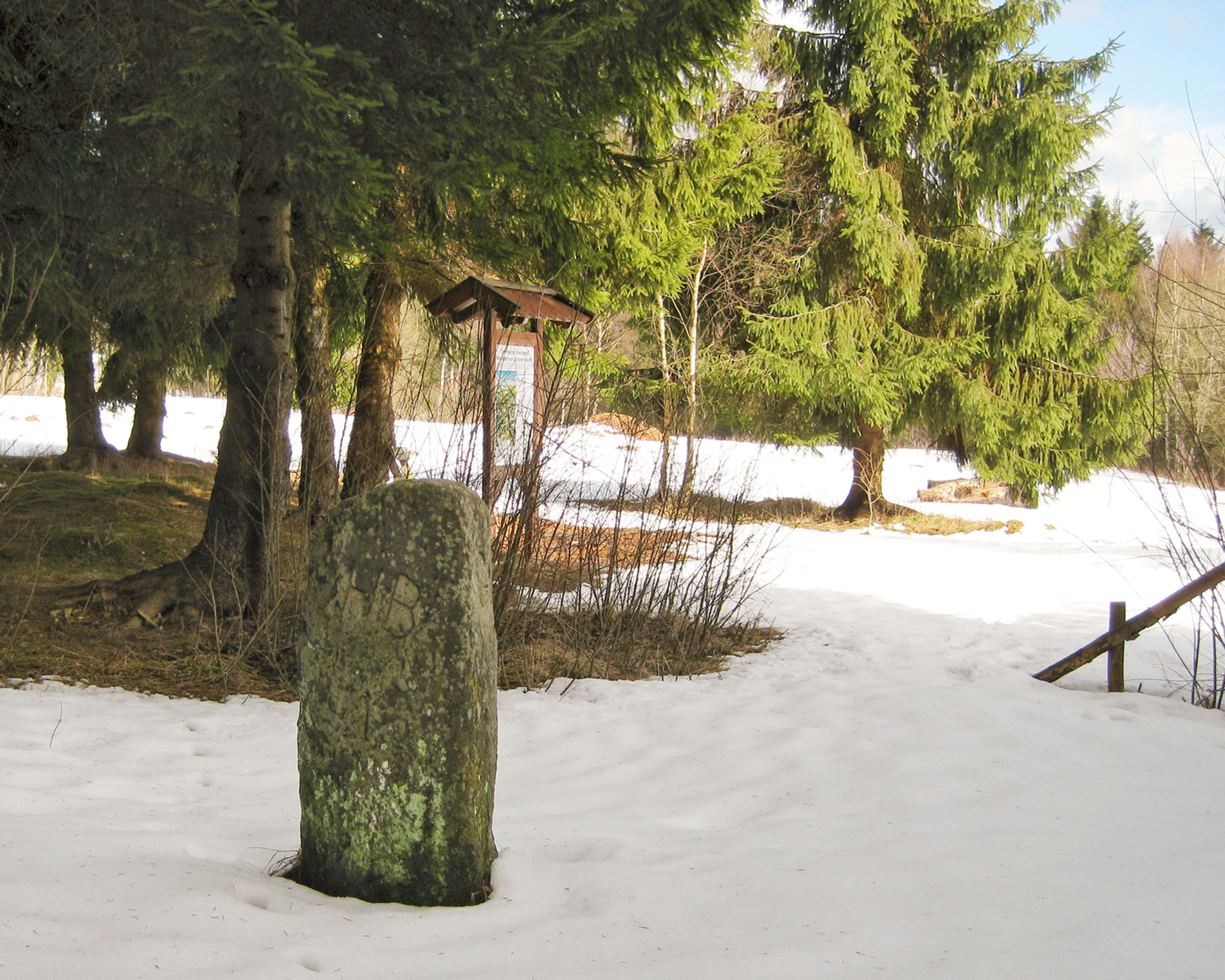 Drei-Länder-Stein bei Benneckenstein, wahrscheinlich 1749 gesetzt. NW-Seite HB (Herzogtum Braunschweig), NO-Seite (Amt Benneckenstein) später geändert in KP (Königreich Preußen), S-Seite GW (Gräflich-Wernigeröder Forstgebiet)